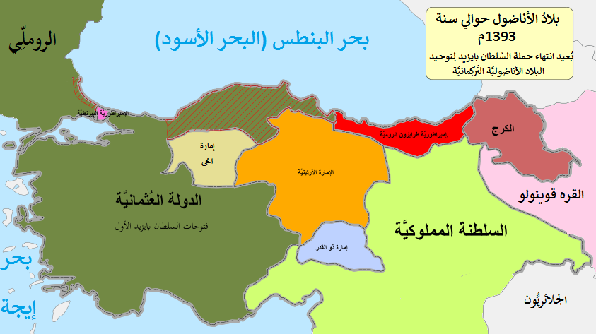 خريطة توضح التقسيم التقريبي لِلأناضول سنة 1393م بُعيد ضم العُثمانيَّة لِلإمارات التُركمانيَّة.